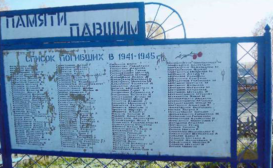 Староиликово (башк. Иҫке Илек) — село в Благовещенском районе Башкортостана.